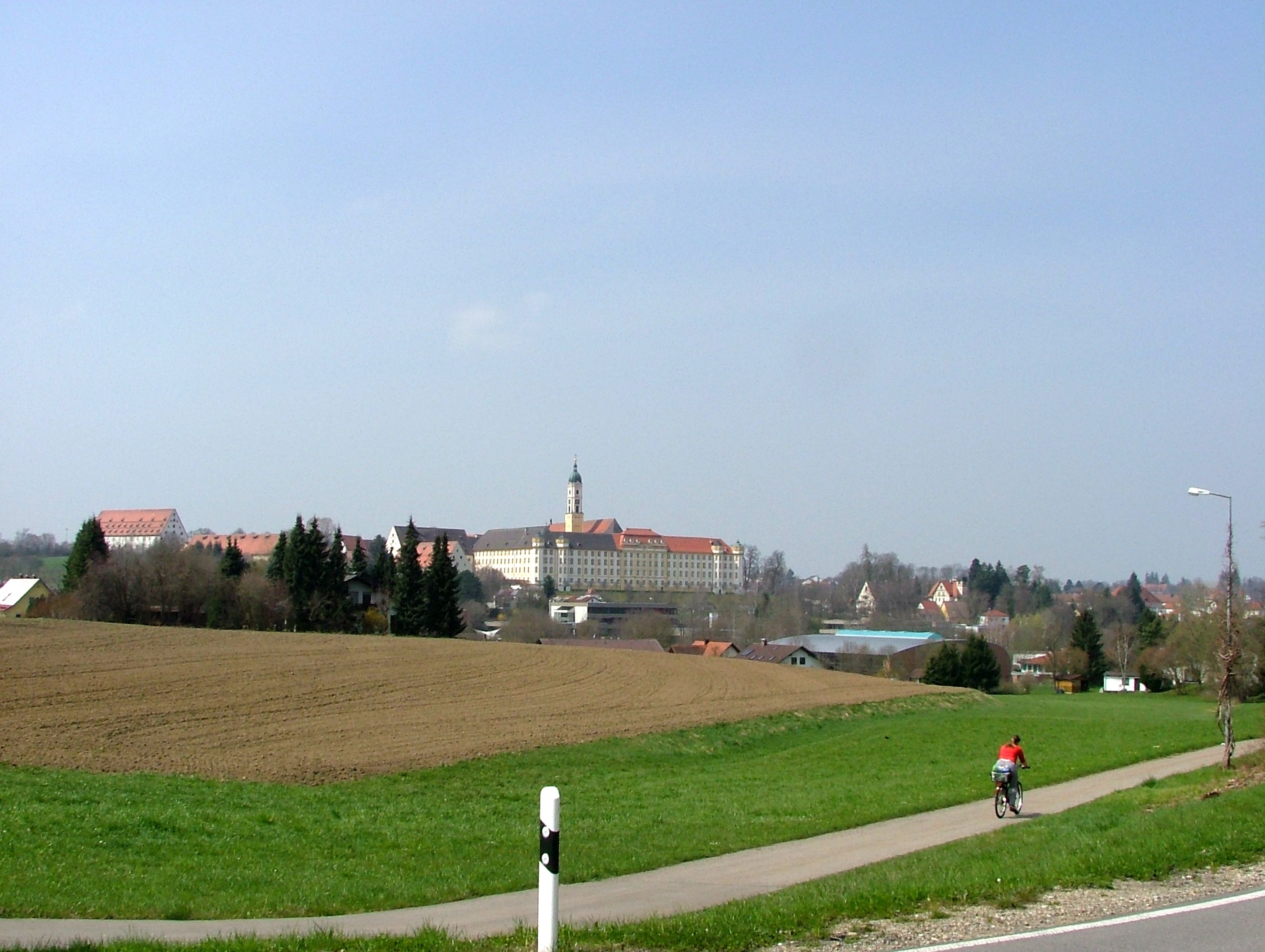 Ochsenhausen